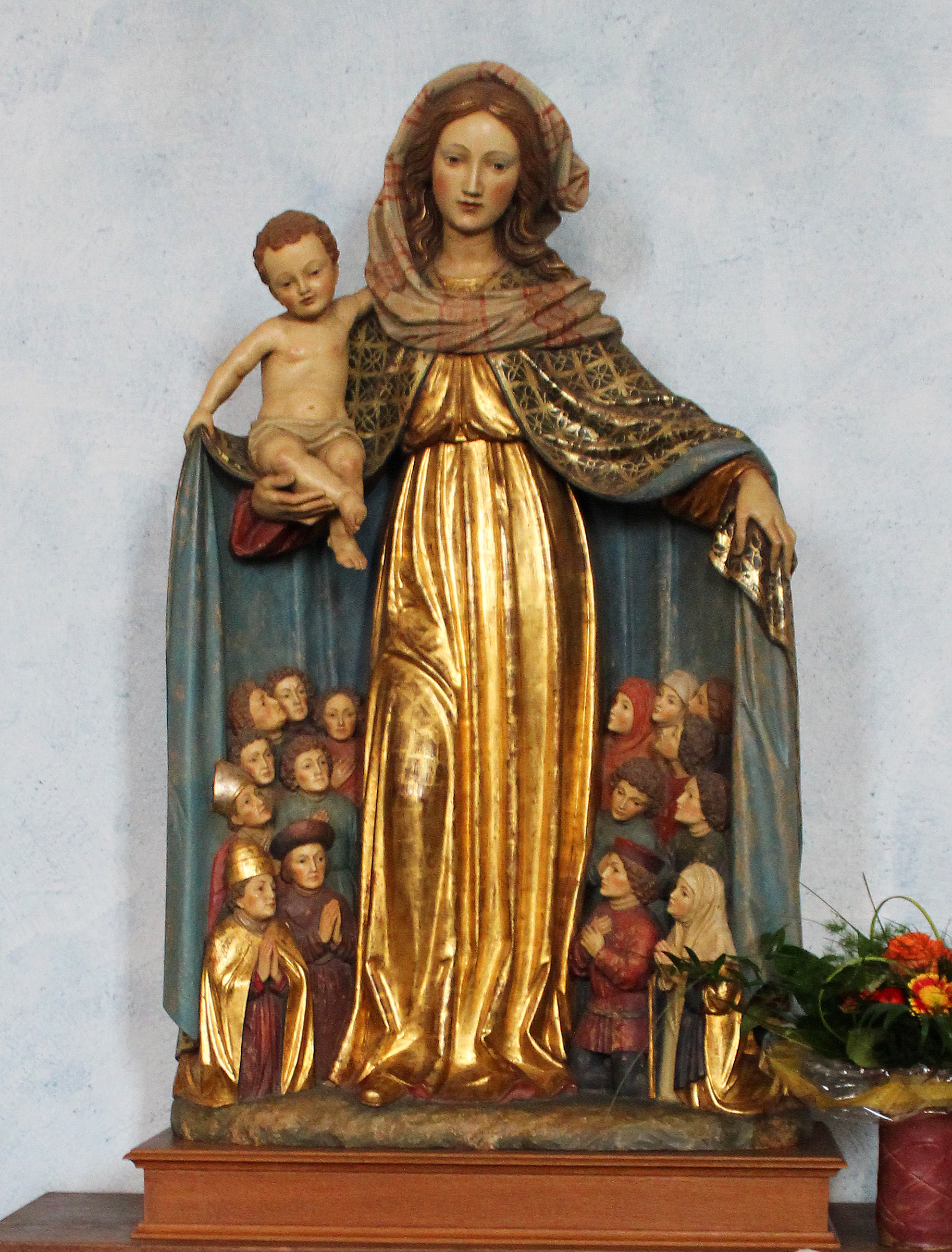 Schutzmantelmadonna in der katholischen Pfarrkirche Mariä Himmelfahrt in Marpingen, Landkreis St. Wendel, Saarland